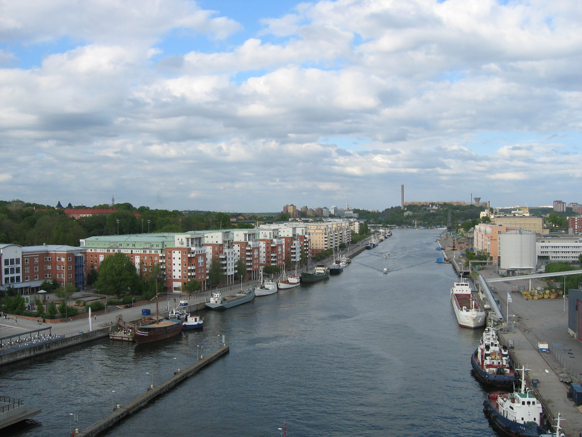 Hammarby canal in Stockholm, Sweden.